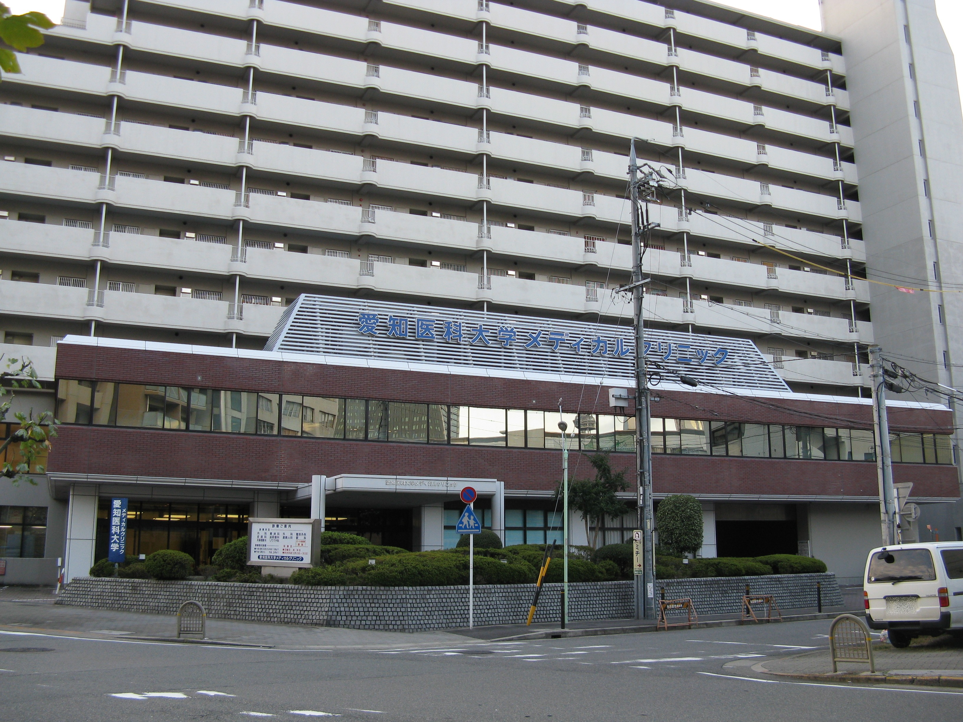 名古屋市東区東桜の愛知医科大学メディカルクリニック